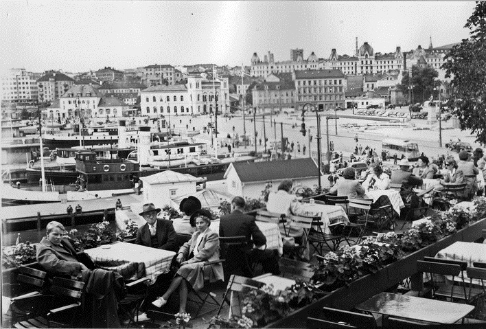 Utsyn over Pipervika fra Skansen restaurant. Båter ved bryggene. Avfotografert postkort.